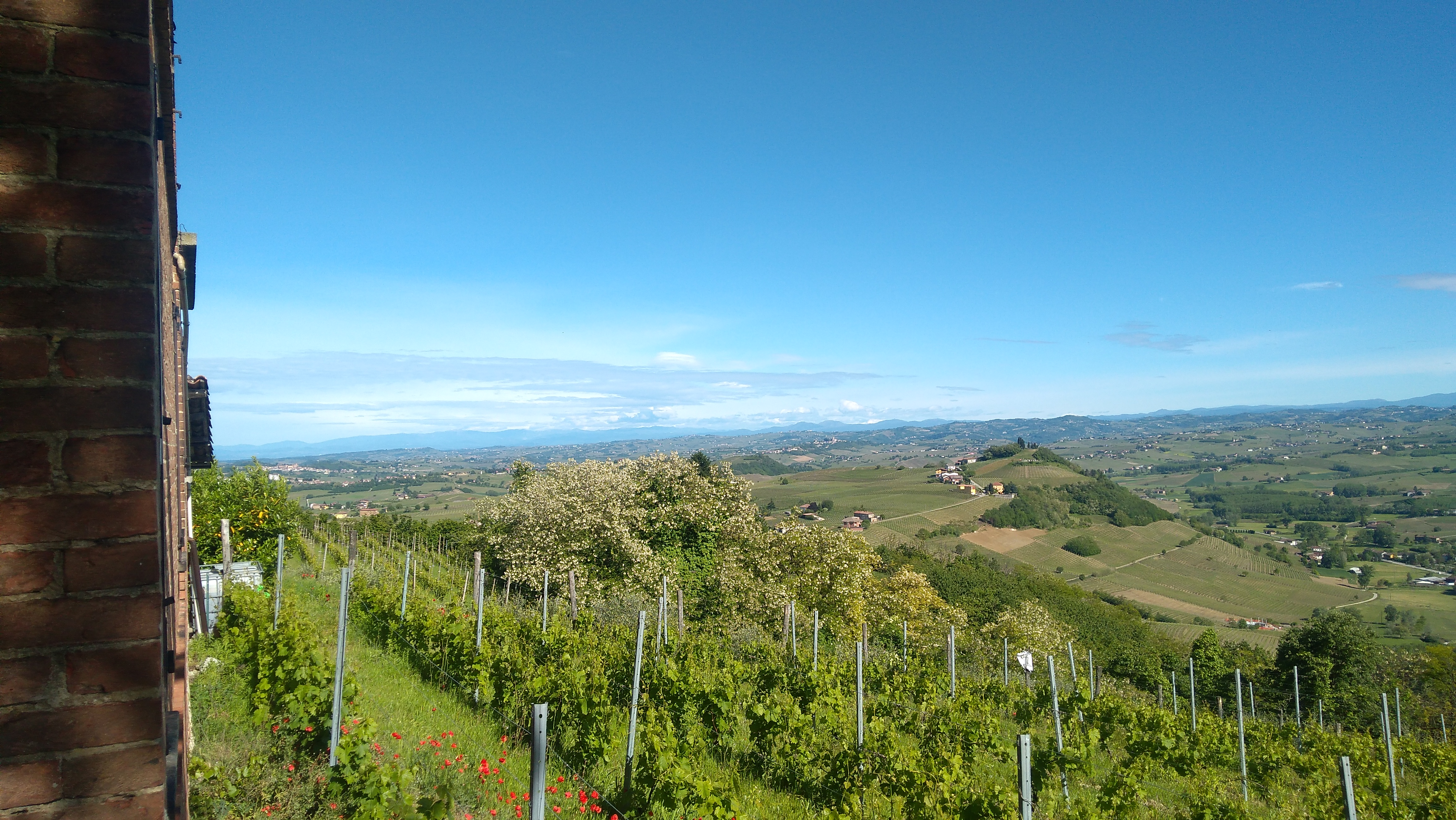 frazione San Michele presso Costigliole d'Asti